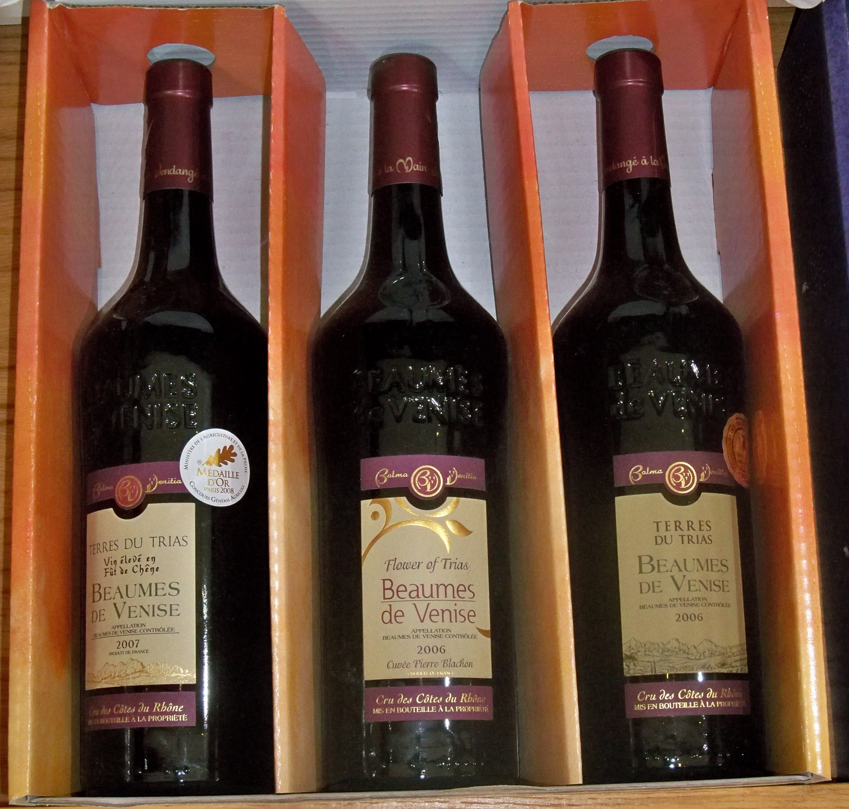 Cuvée de Terres du Trias de Beaumes de Venise, Vaucluse